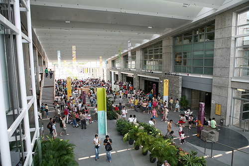 中文（香港）: 香港濕地公園。